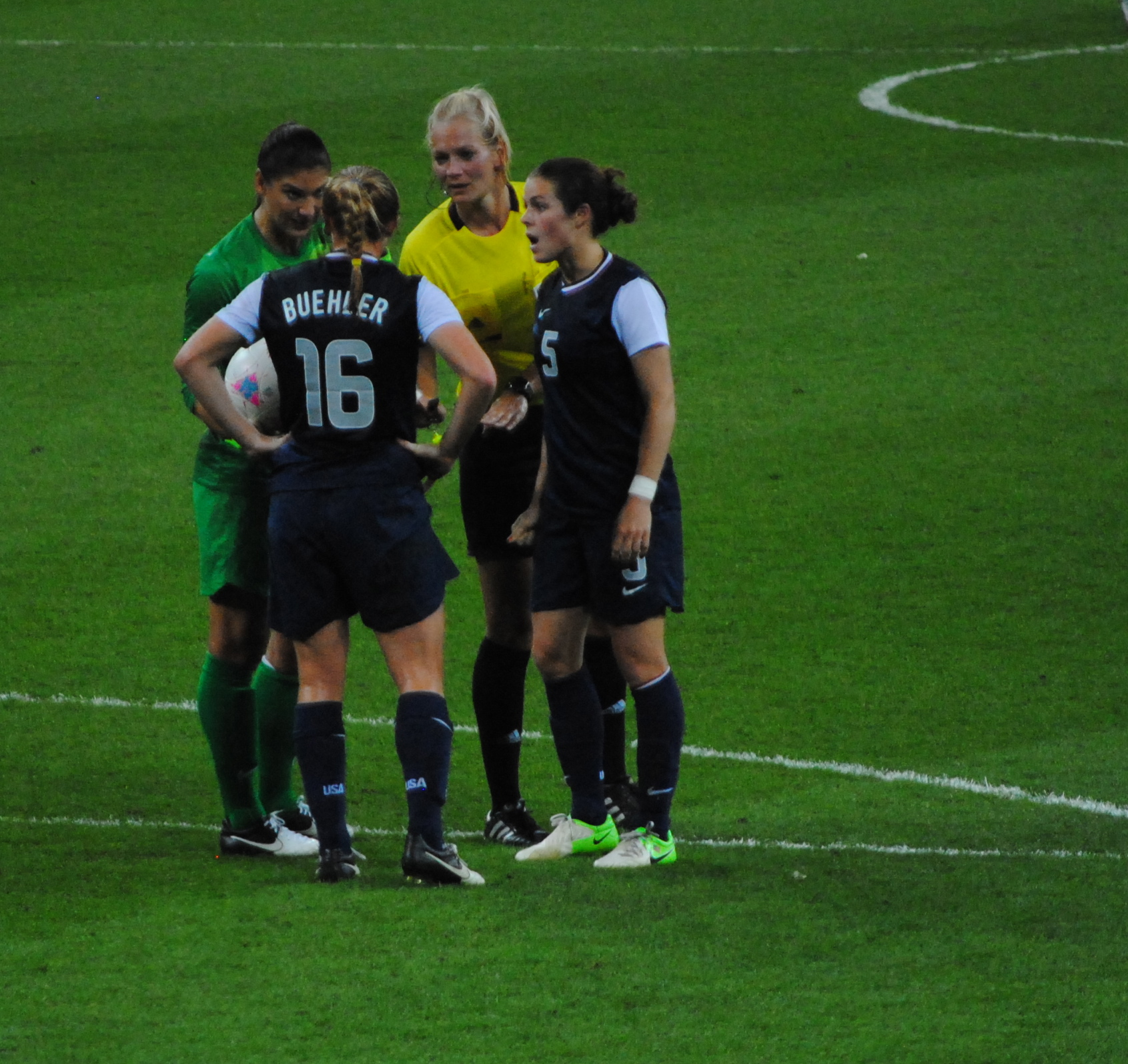 USA vs Japan